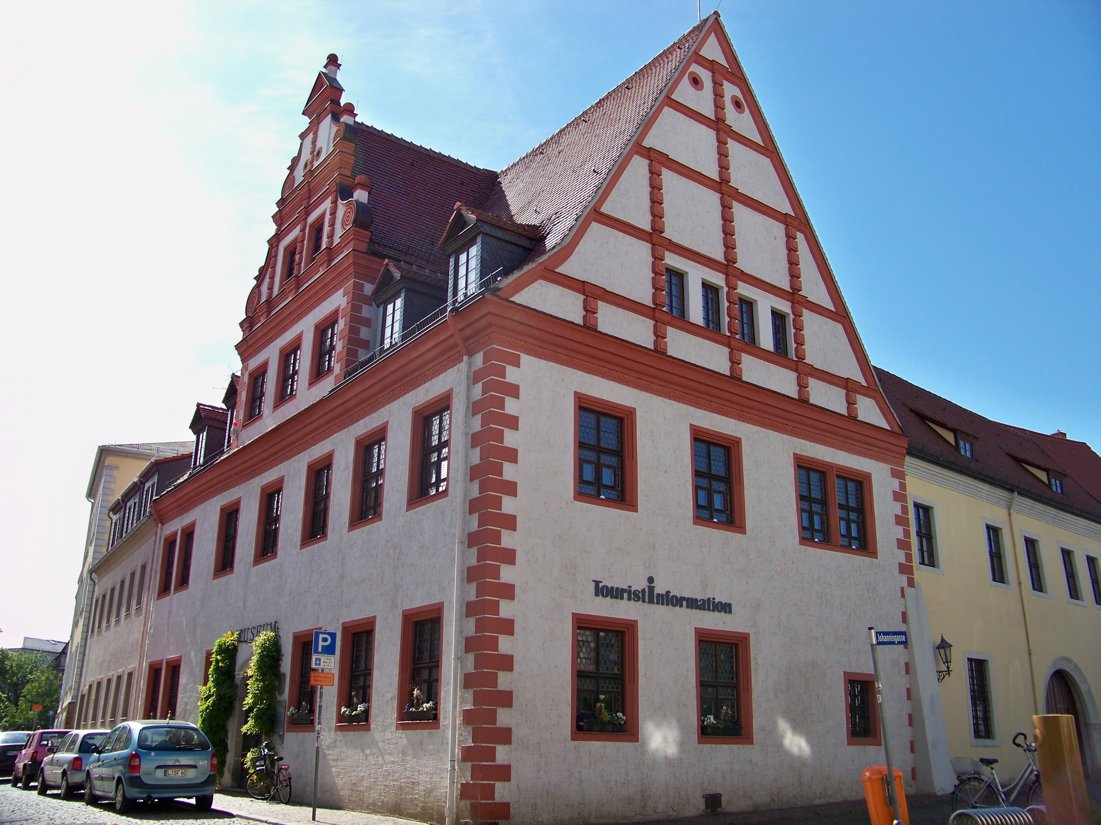 Museum und Touristinfo in Wurzen